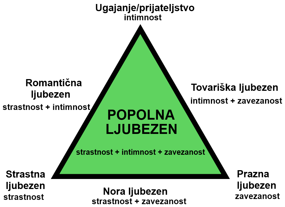 Grafični prikaz trikotne teorije ljubezni